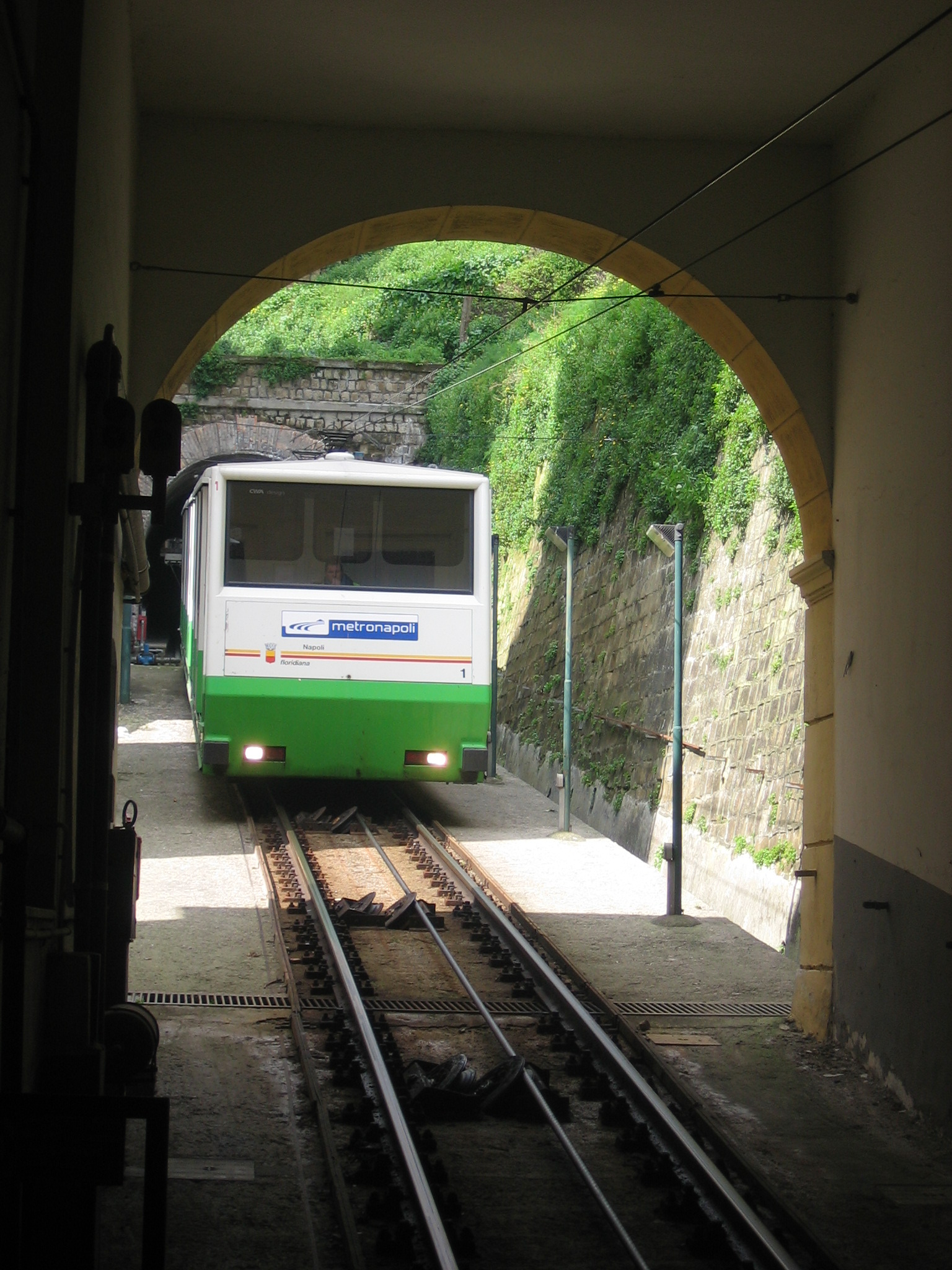 Funicolare di Napoli